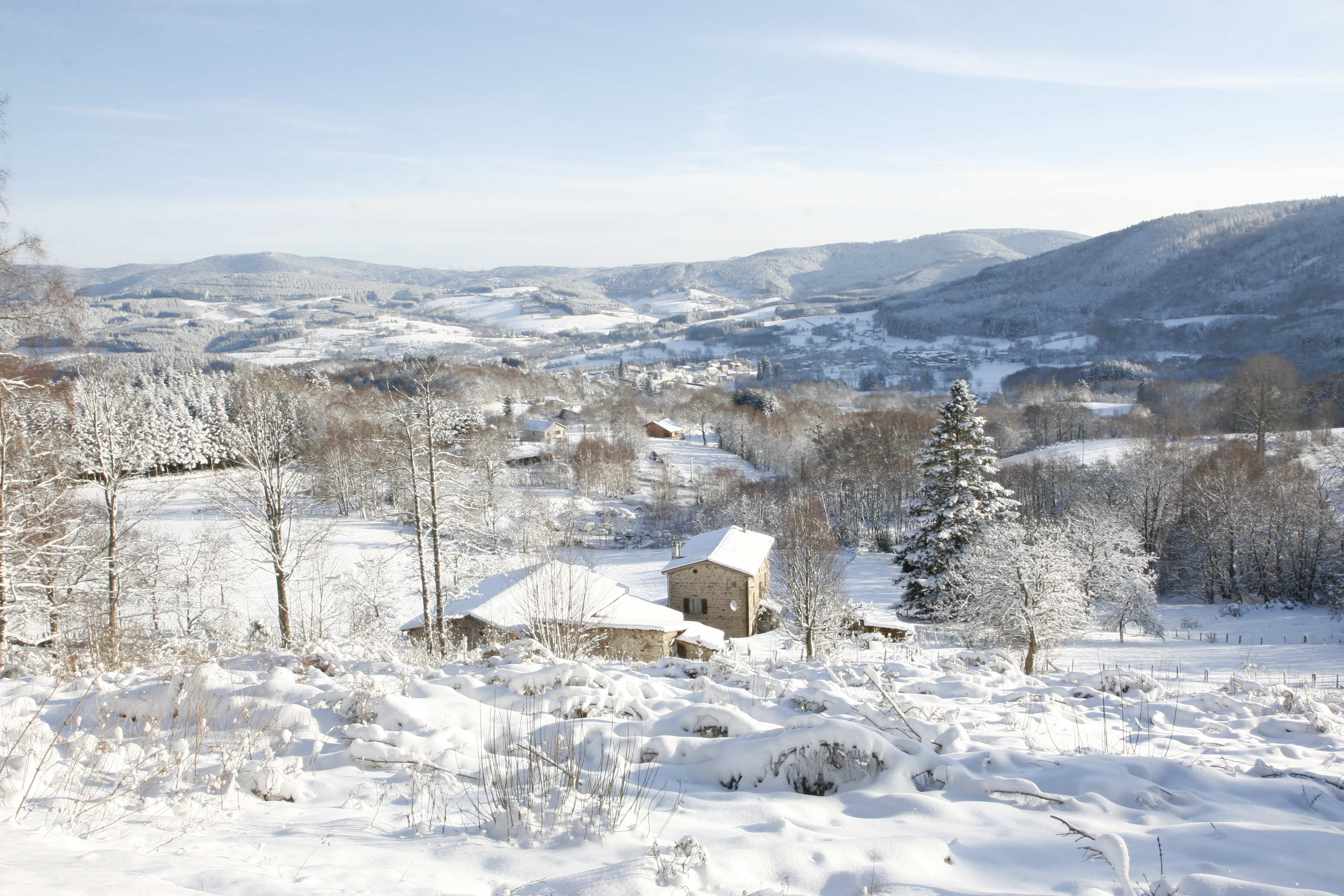 Viscomtat : France's village (Auvergne, 63) In winter (2005-06)